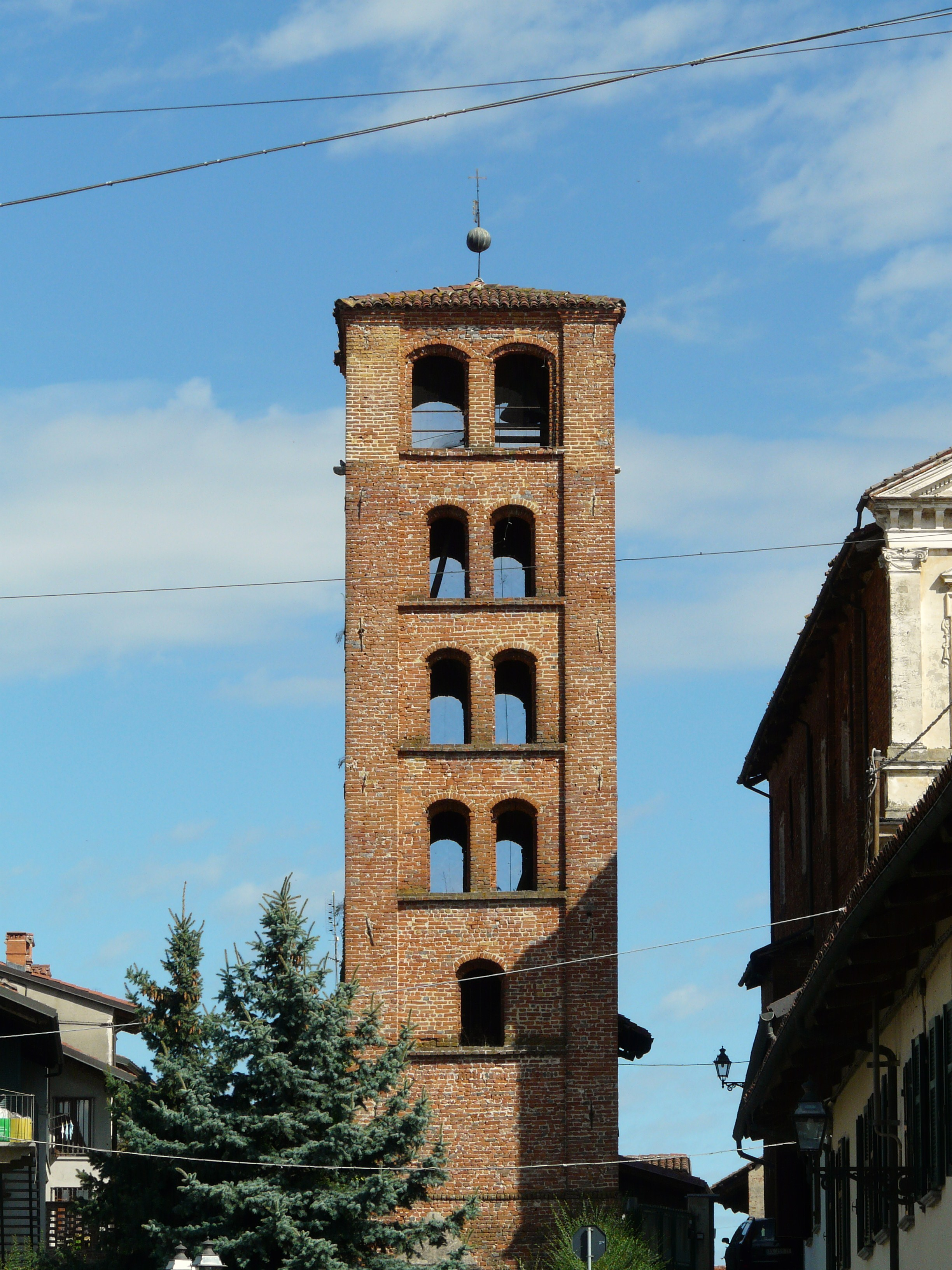 Torre civica, Marene, Piemonte, Italia